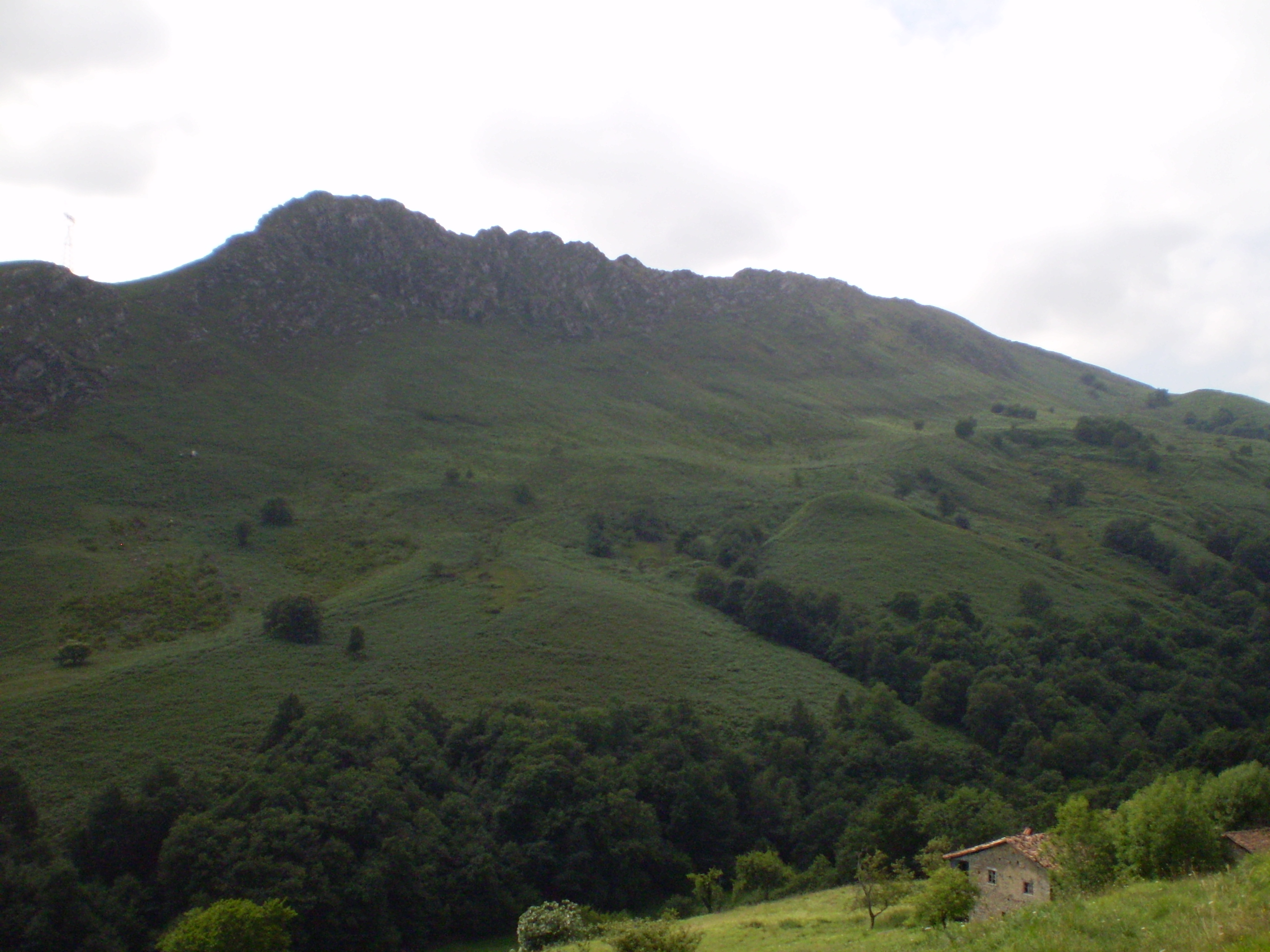 sierra